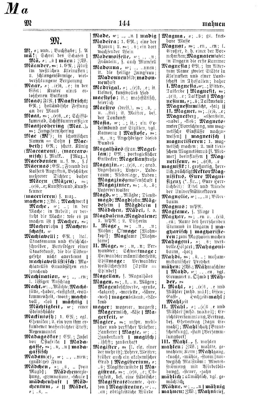 Seite 144 von Karl Erbe: Wörterbuch der deutschen Rechtschreibung. Union Deutsche Verlagsgesellschaft, Stuttgart, Berlin, Leipzig 1902.